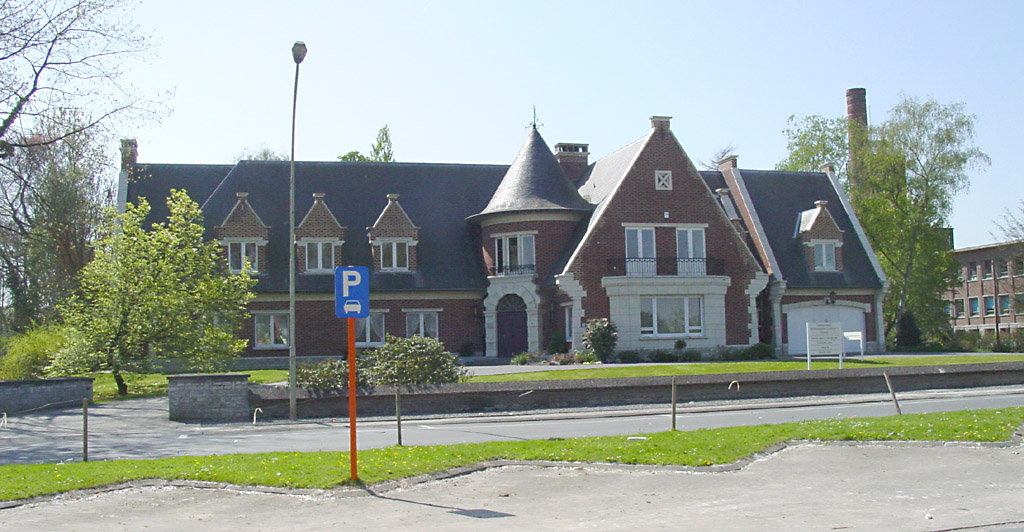 The Gemeentehuis (town hall) in Opwijk, Belgium, building 2